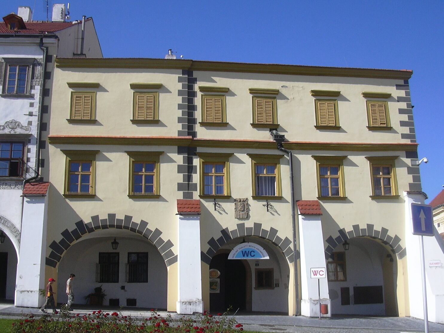 Dům Hejtmanský v Kroměříži